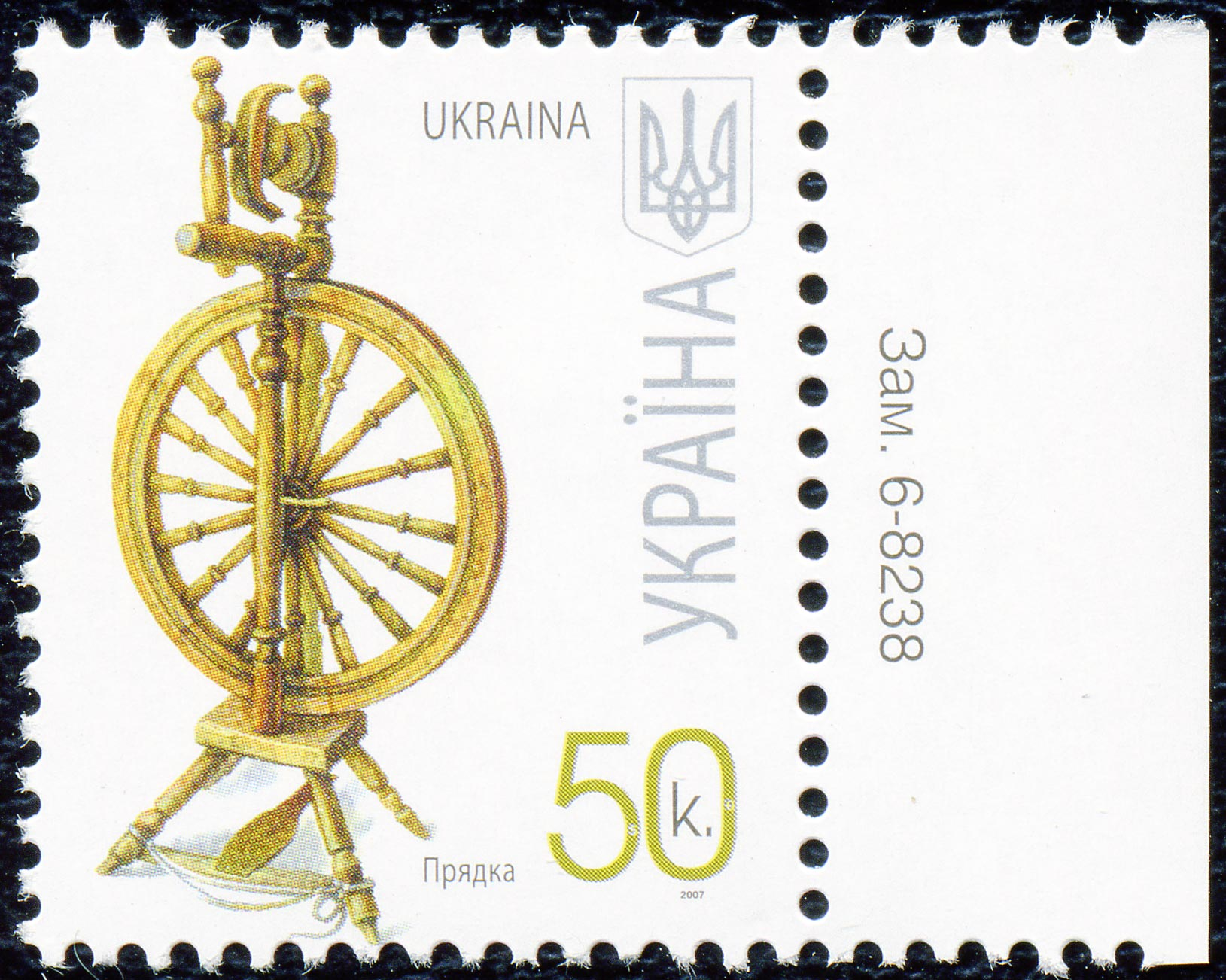 Стандартная почтовая марка Украины. 2007. Прялка